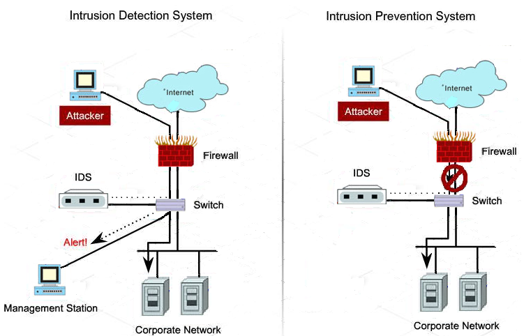 урезанная копия